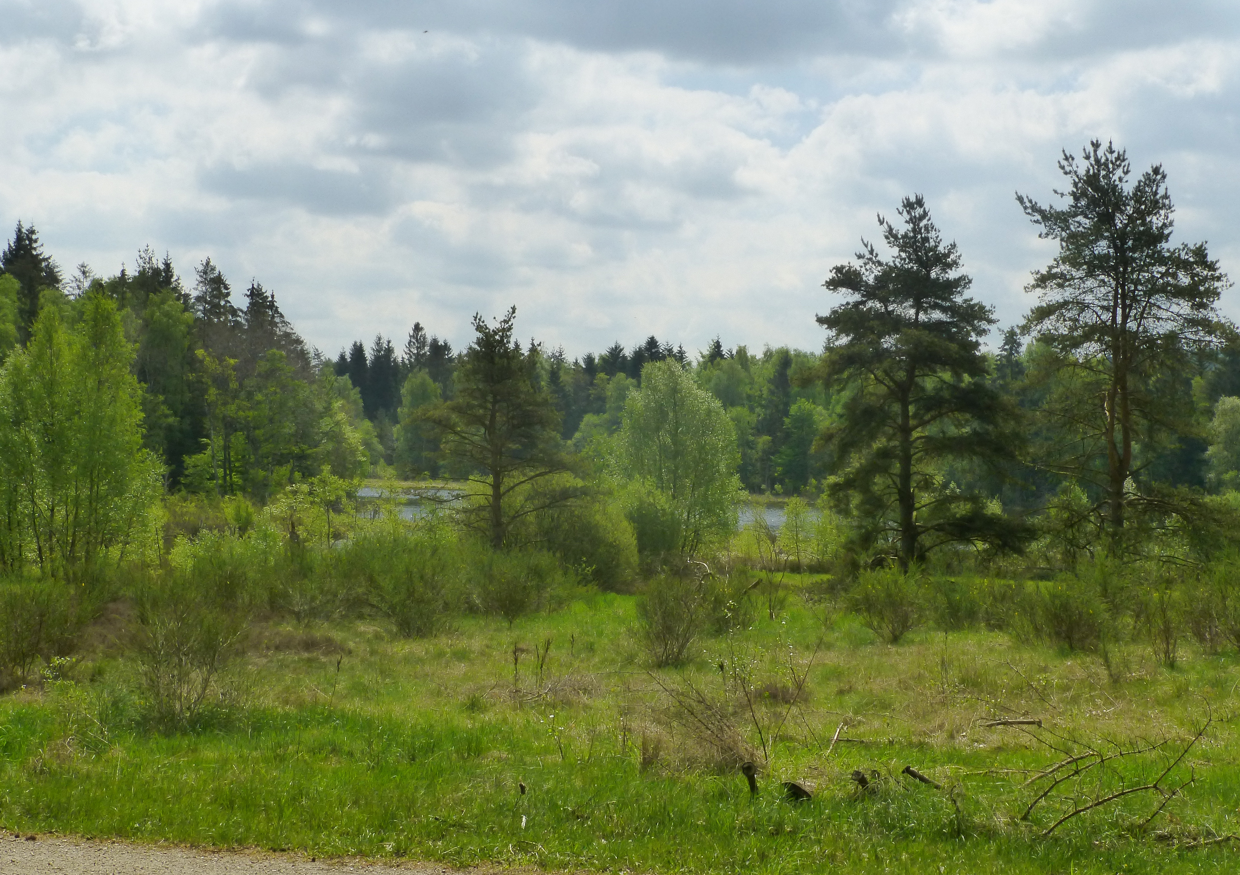 Addit Skov ved Svinesø, lige syd for Salten Langsø